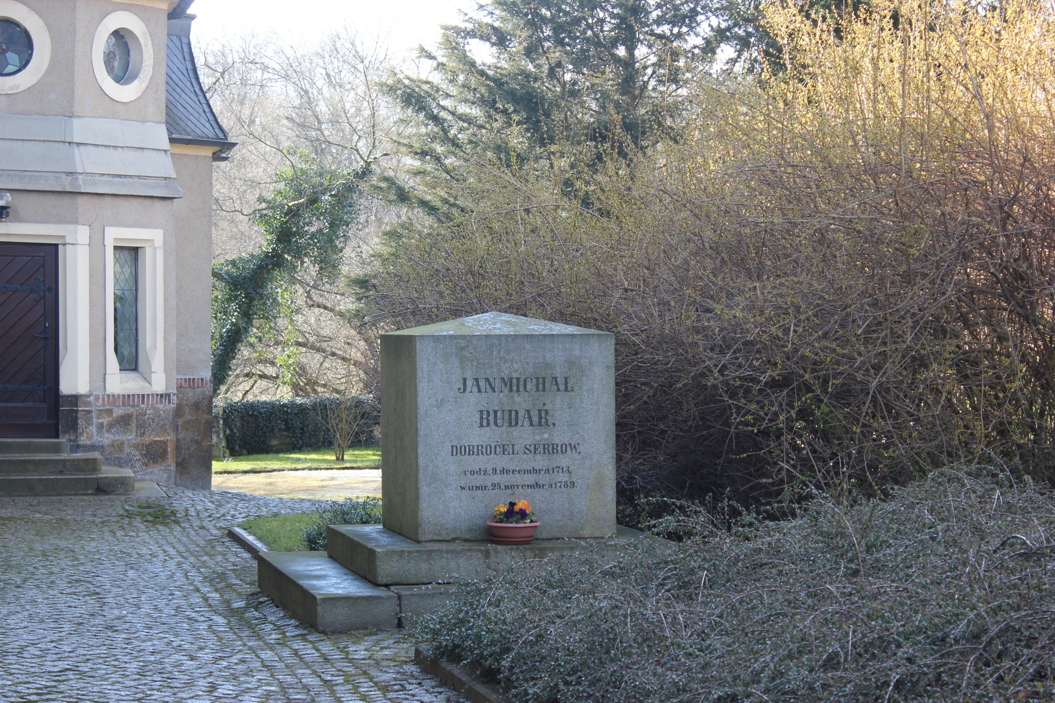 Hornjoserbsce: Wopomnjenski kamjeń Janej Michałej Budarjej při cyrkwi w Budestecach.